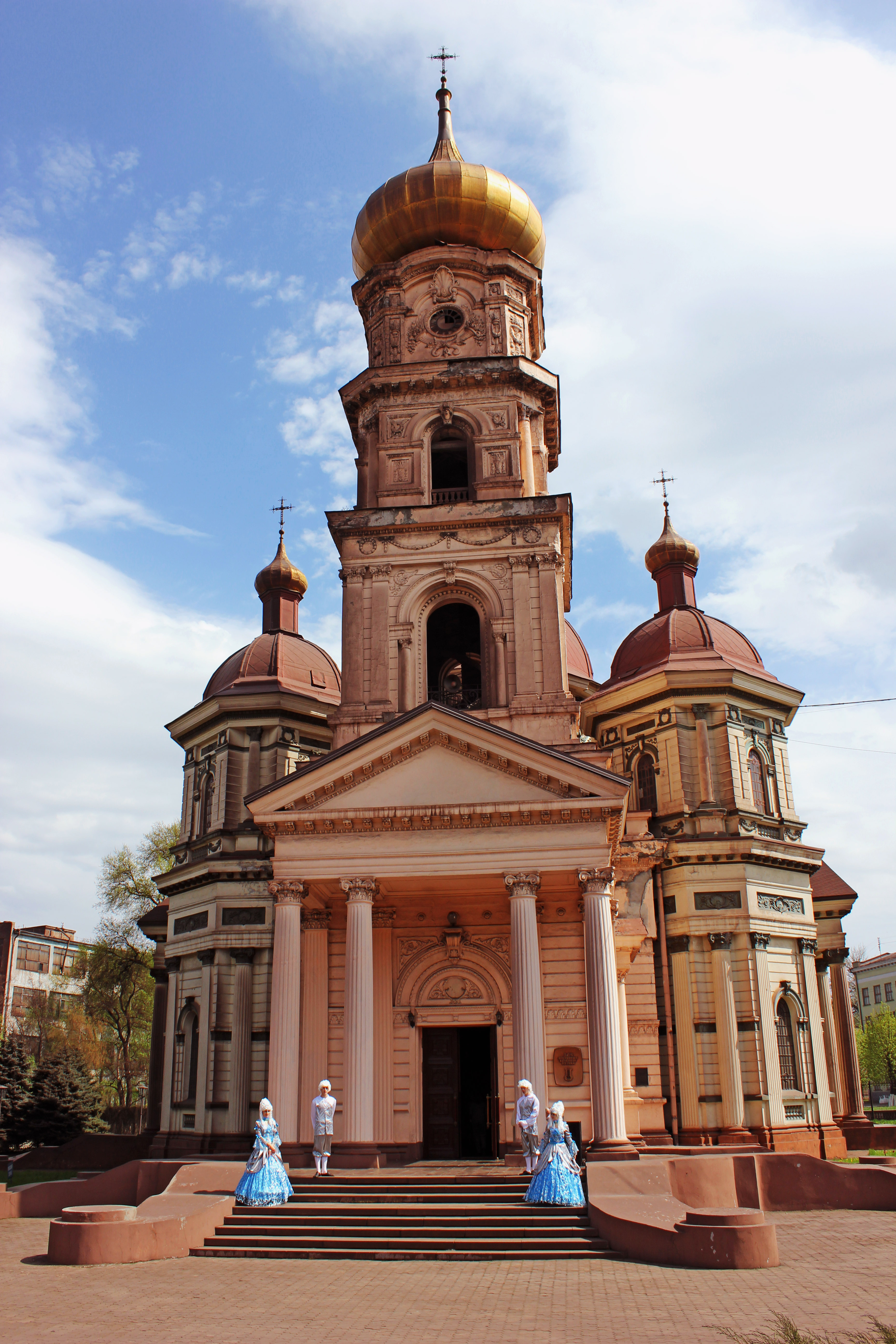 Брянська Миколаївська церква (мур.), Дніпропетровськ, пр.Калініна, 66